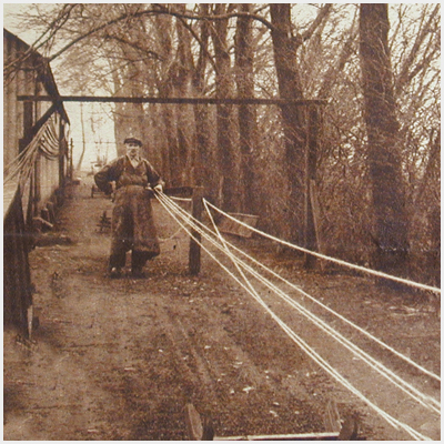 Een van de eerste lijnbanen van Lankhorst touwfabrieken